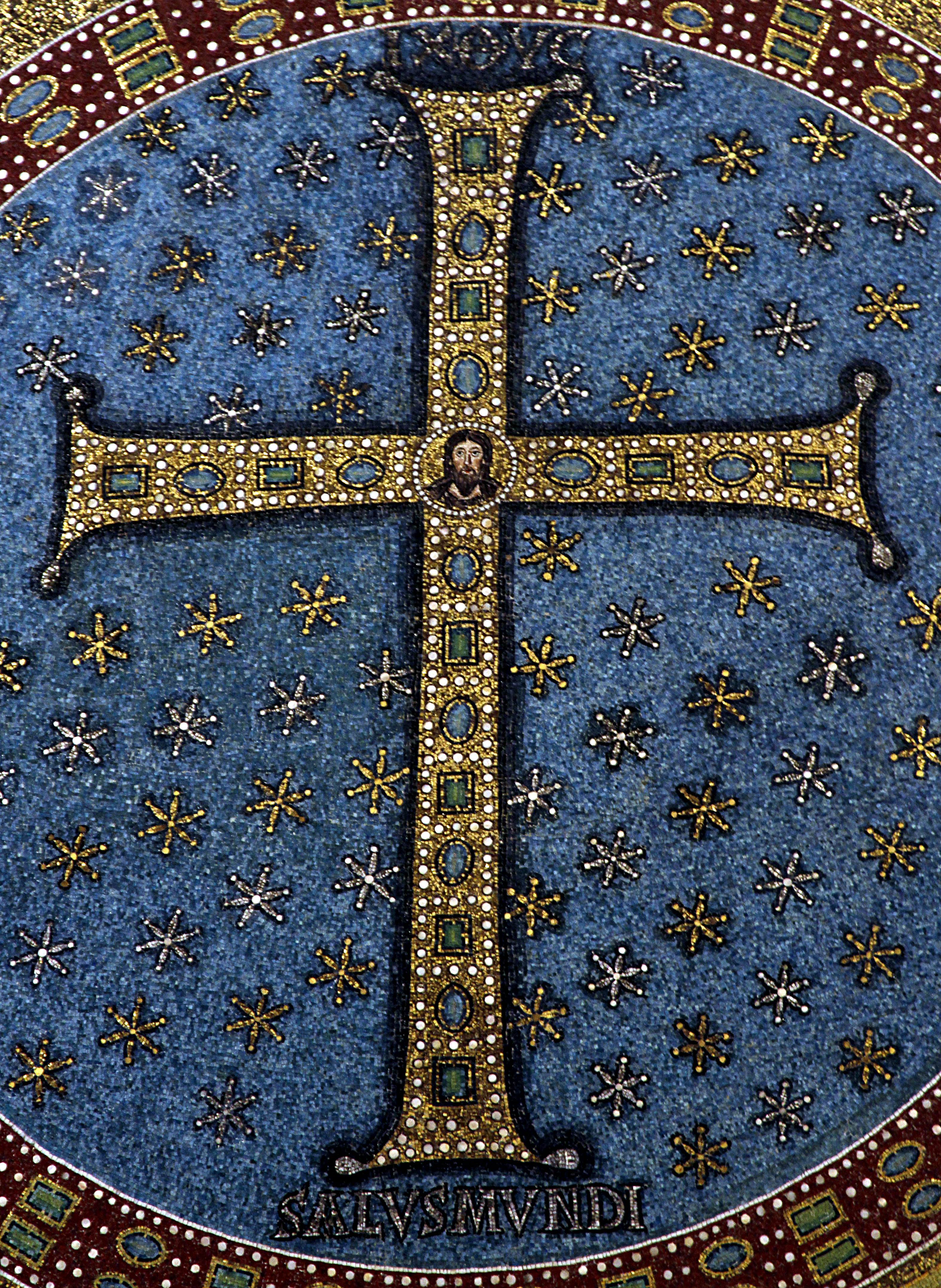 Sant'Apollinare in Classe - Ravenna